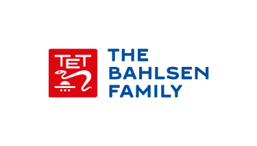 Logo der Bahlsen Gruppe